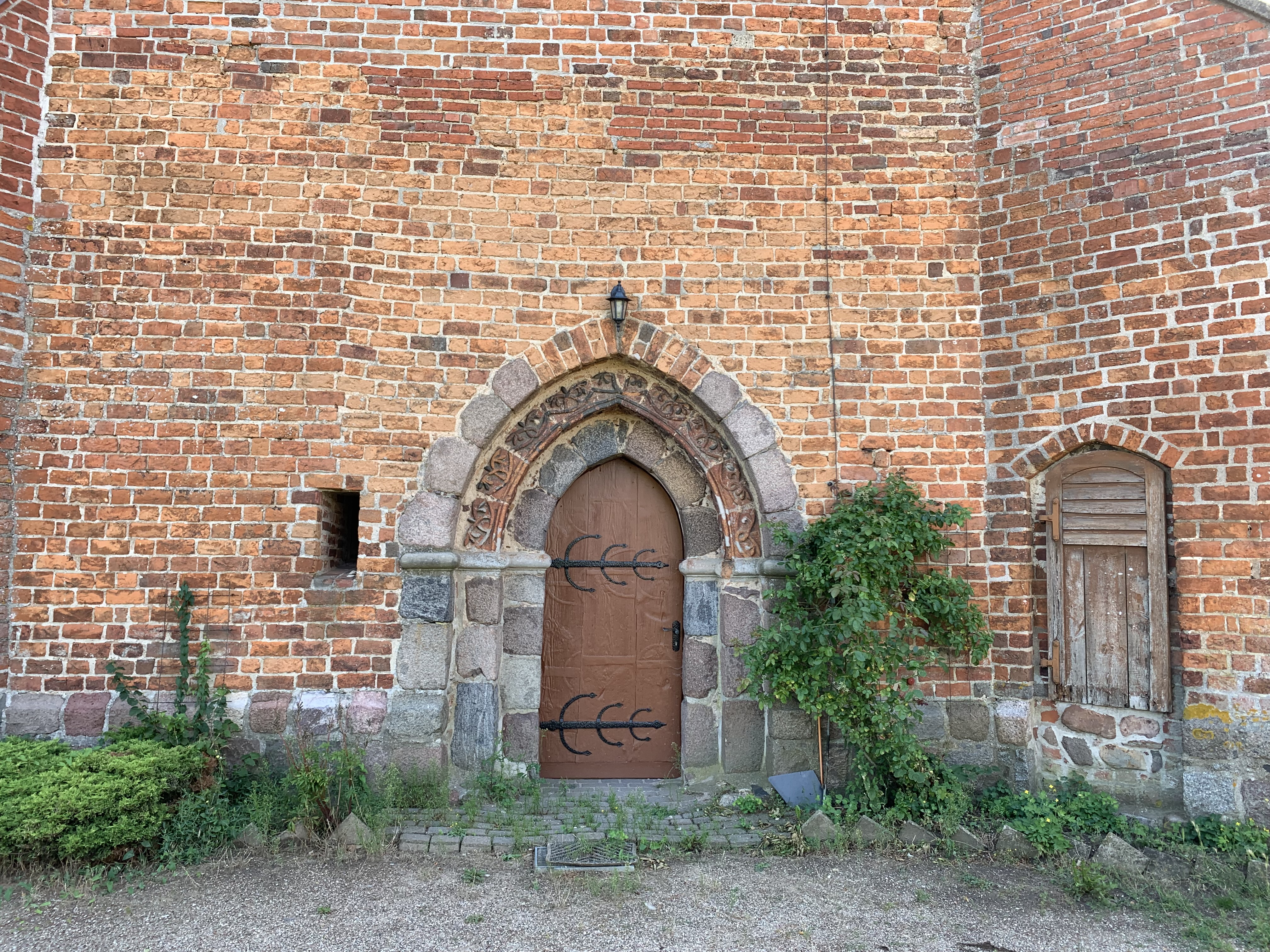 Die Kirche Holzendorf der Gemeinde Groß Miltzow im Landkreis Mecklenburgische Seenplatte ist eine Backsteinkirche aus dem Anfang des 14. Jahrhunderts. Im Innern steht unter anderem ein Altarretabel aus der Zeit um 1730.